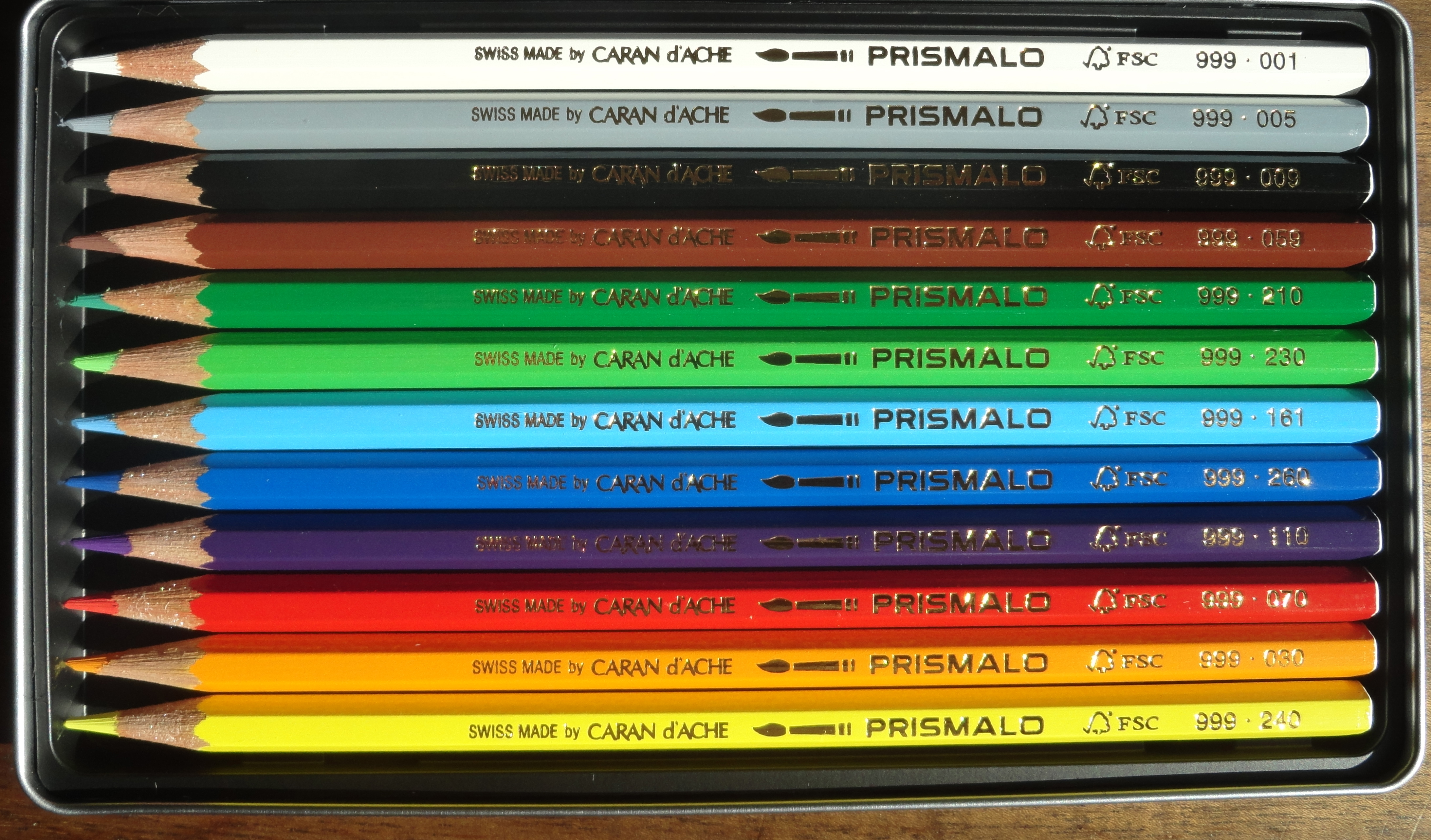 Farbstifte von Caran d'Ache